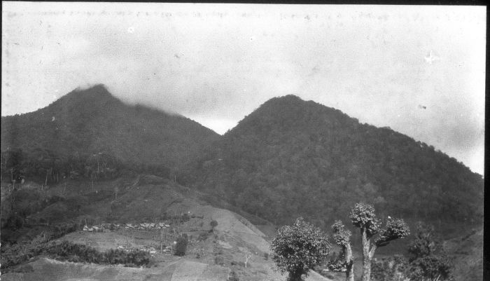 Foto. De Goenoeng Tiloe, Malabar gebergte, West-Java